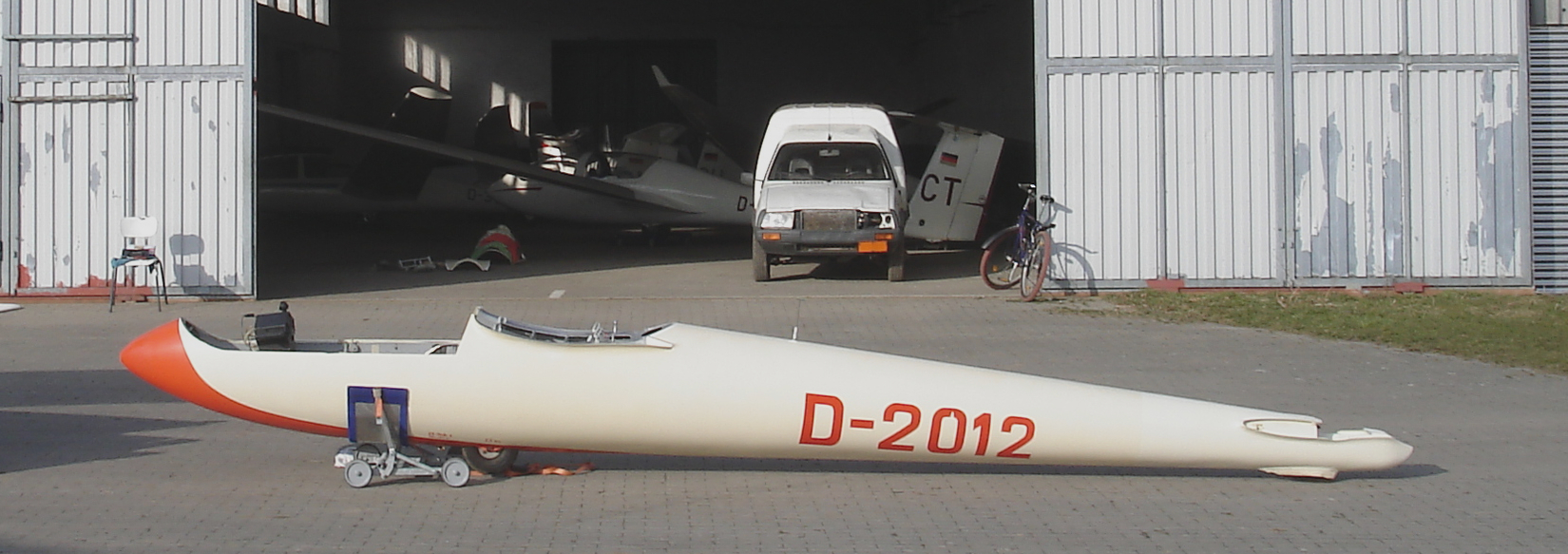 Flugzeughalle mit Toröffnung nach Südwesten. Im Vordergrund Rumpf einer Akaflieg Braunschweig SB 5 b, D-2012